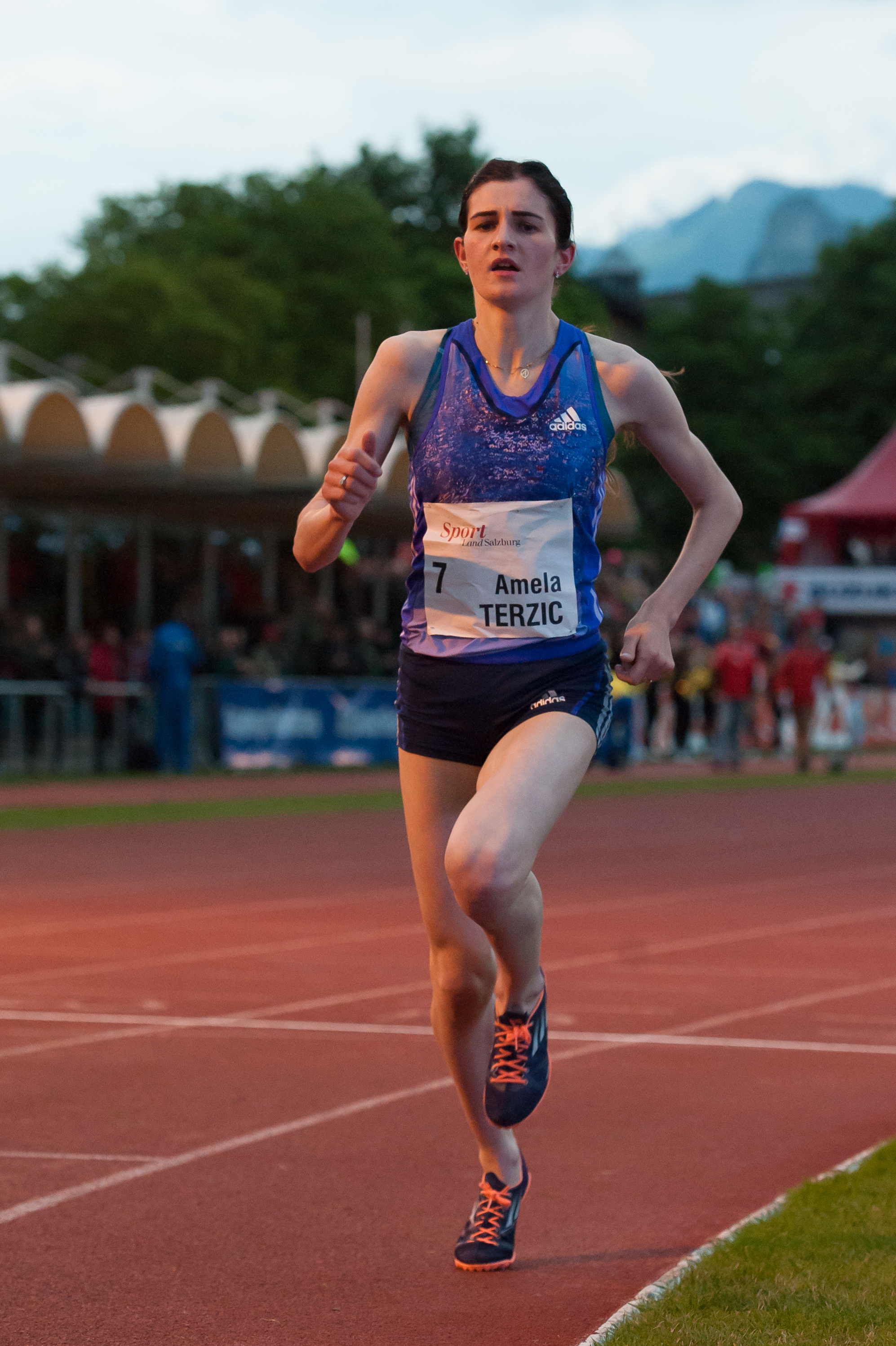 Salzburger Leichtathletik Gala am 27. Mai 2015: Amela Terzic